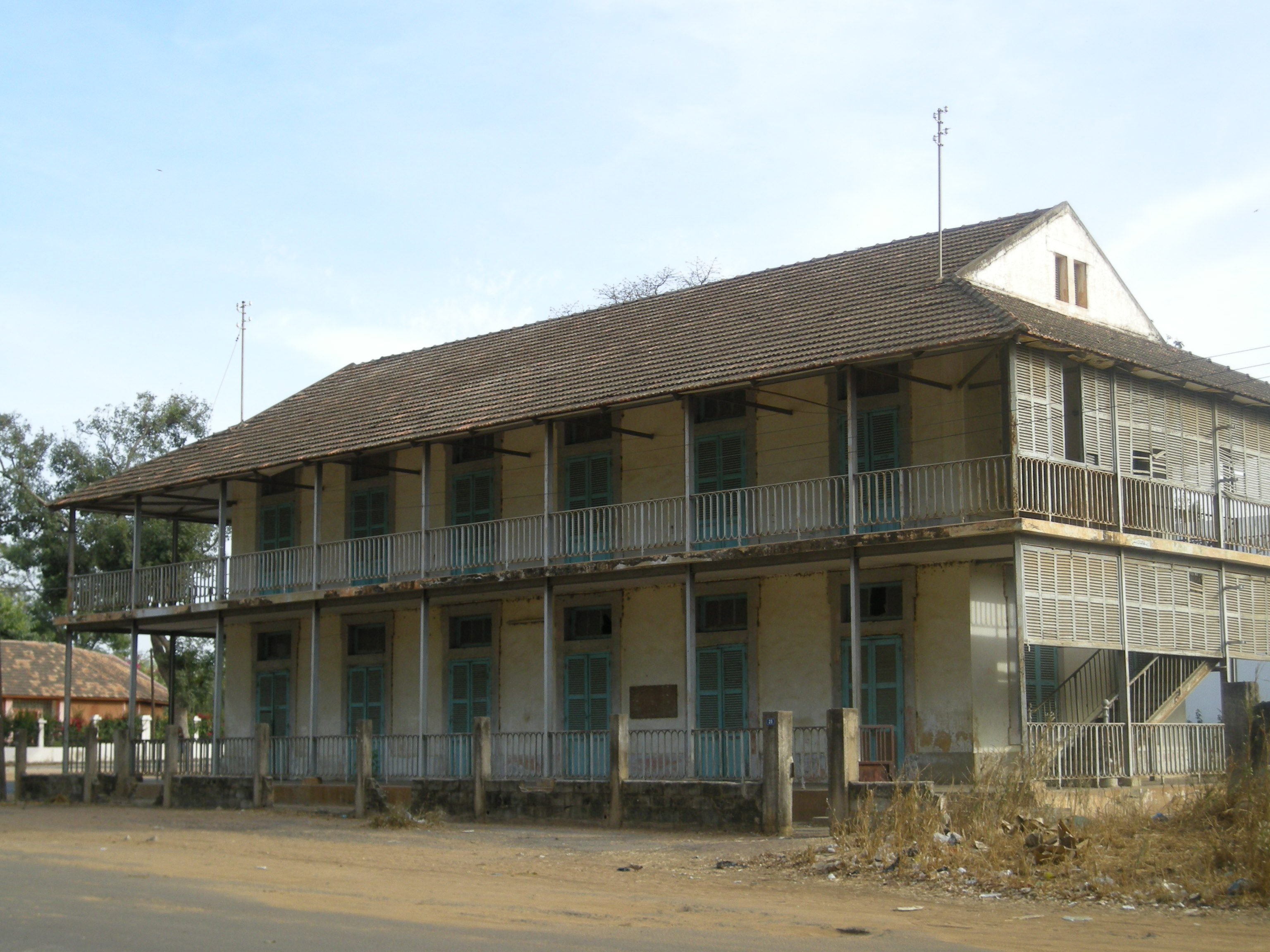 Maison coloniale à Thiès (Sénégal)